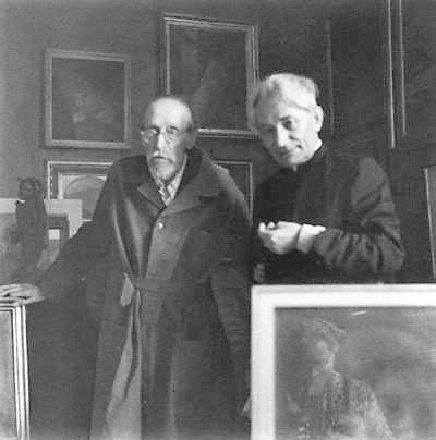 Ugo Bernasconi e Cesare Angelini